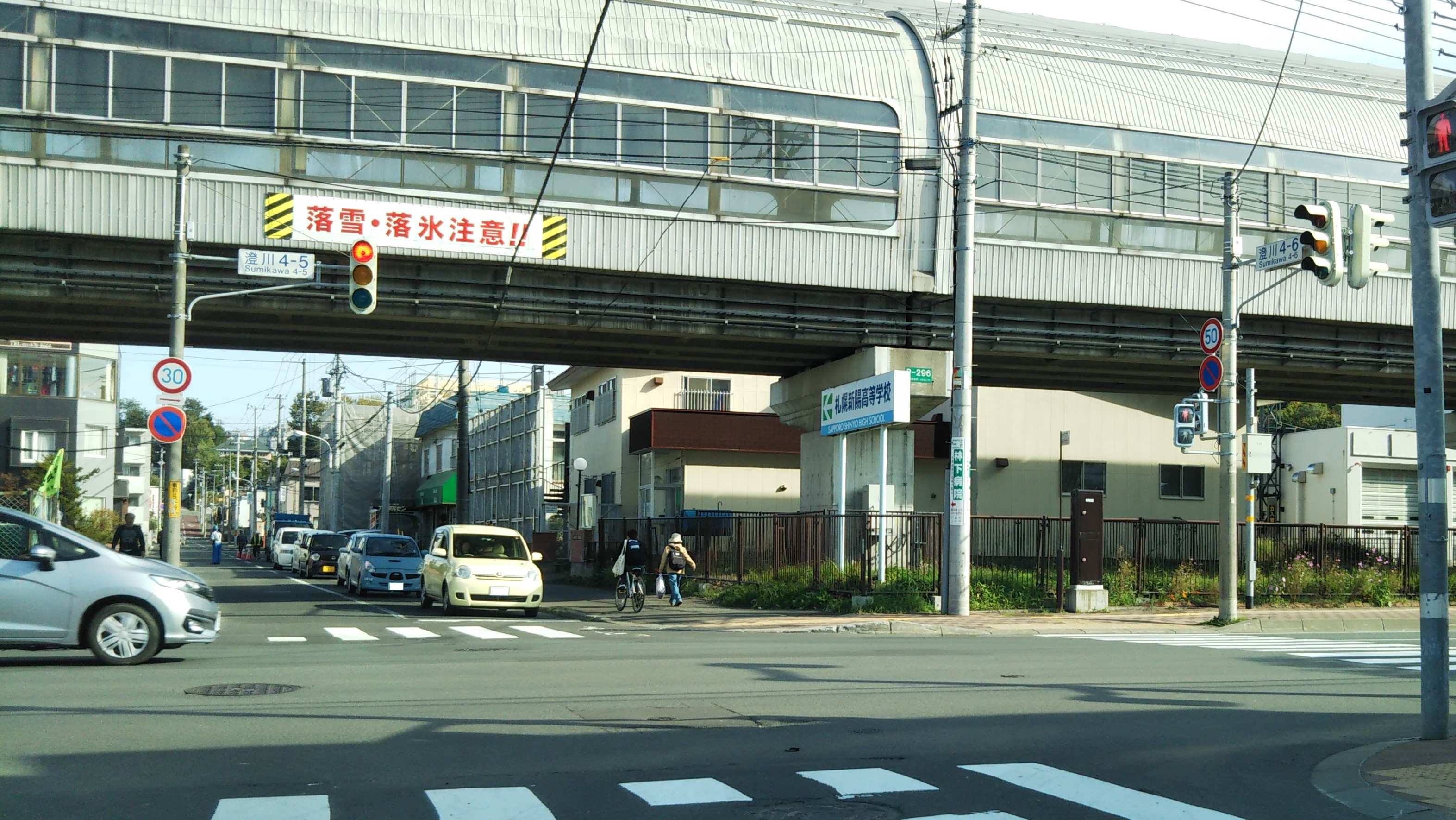 定山渓鉄道慈恵学園停留所跡地